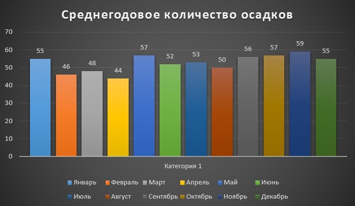 Гистограмма погоды в Плезире